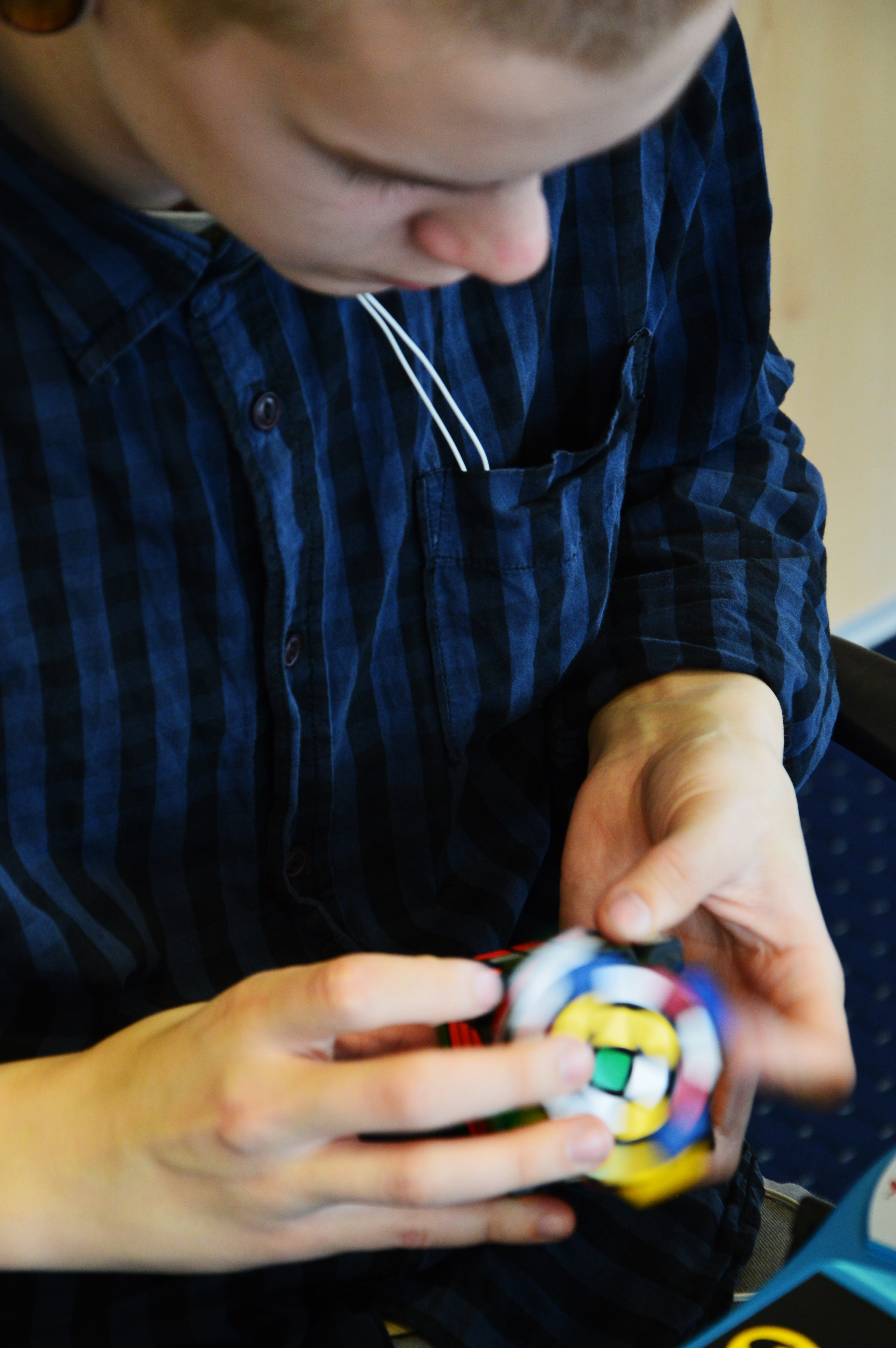 5x5 kuubiku lahendamine. Estonian Open 2013.